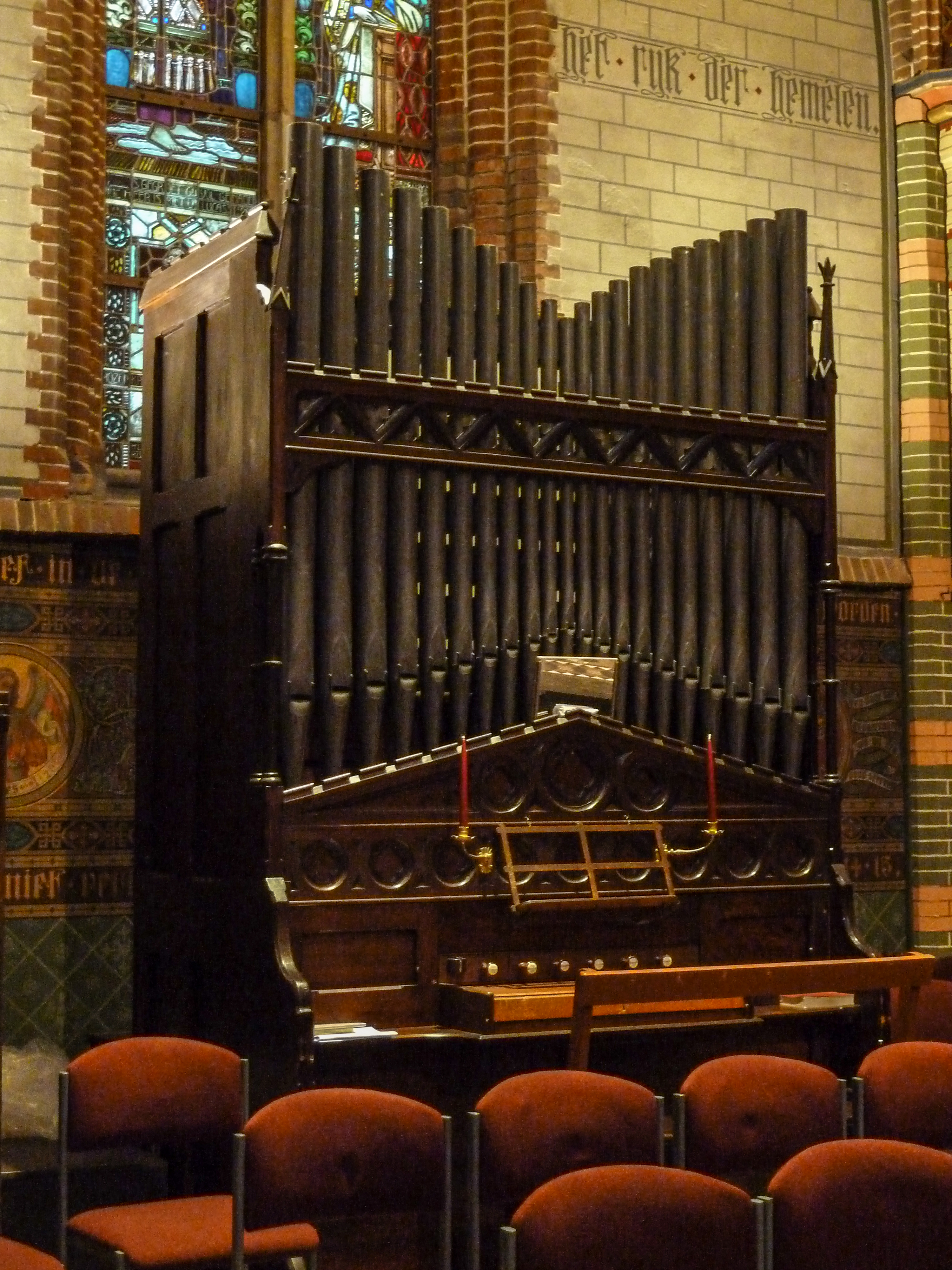 Koororgel van de Sint-Jozefkerk